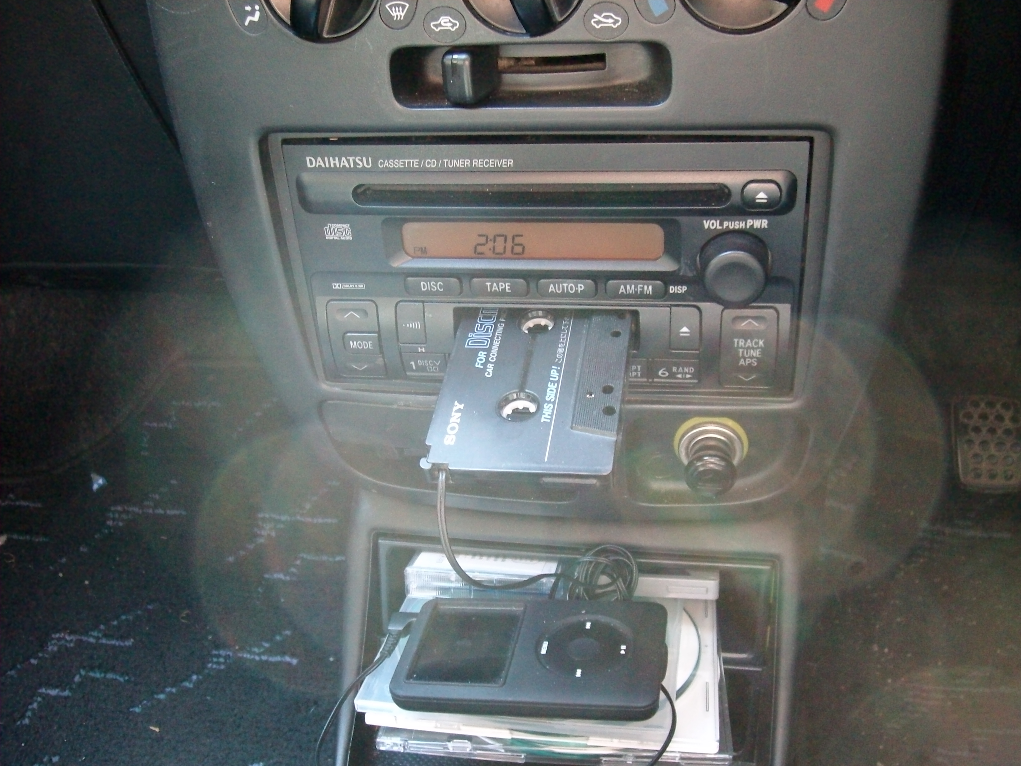 撮影者本人の所有する自動車です。この車は2004年登録です。このiPodは2013年製造です。このカセットアダプターはおそらく1980年代後半製造です。